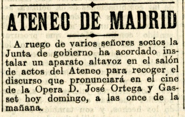 Anuncio breve sobre la instalación de megafonía en el Ateneo de Madrid para escuchar el discurso de Ortega y Gasset del 6 de Diciembre de 1931, conocido como "Rectificación de la República"